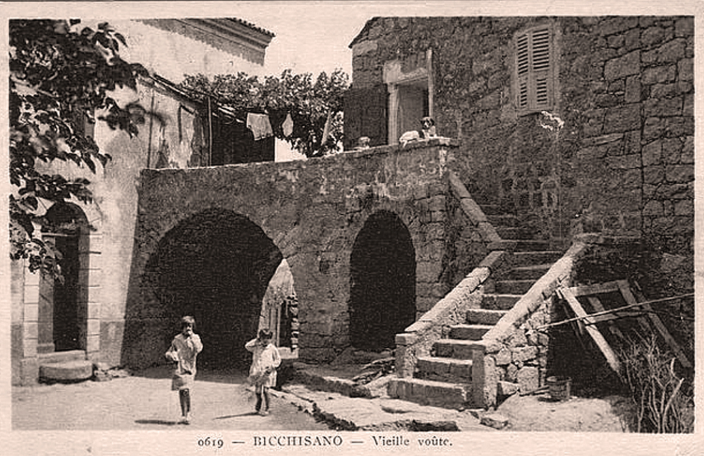 Village de Bicchisano au début du XXe siècle